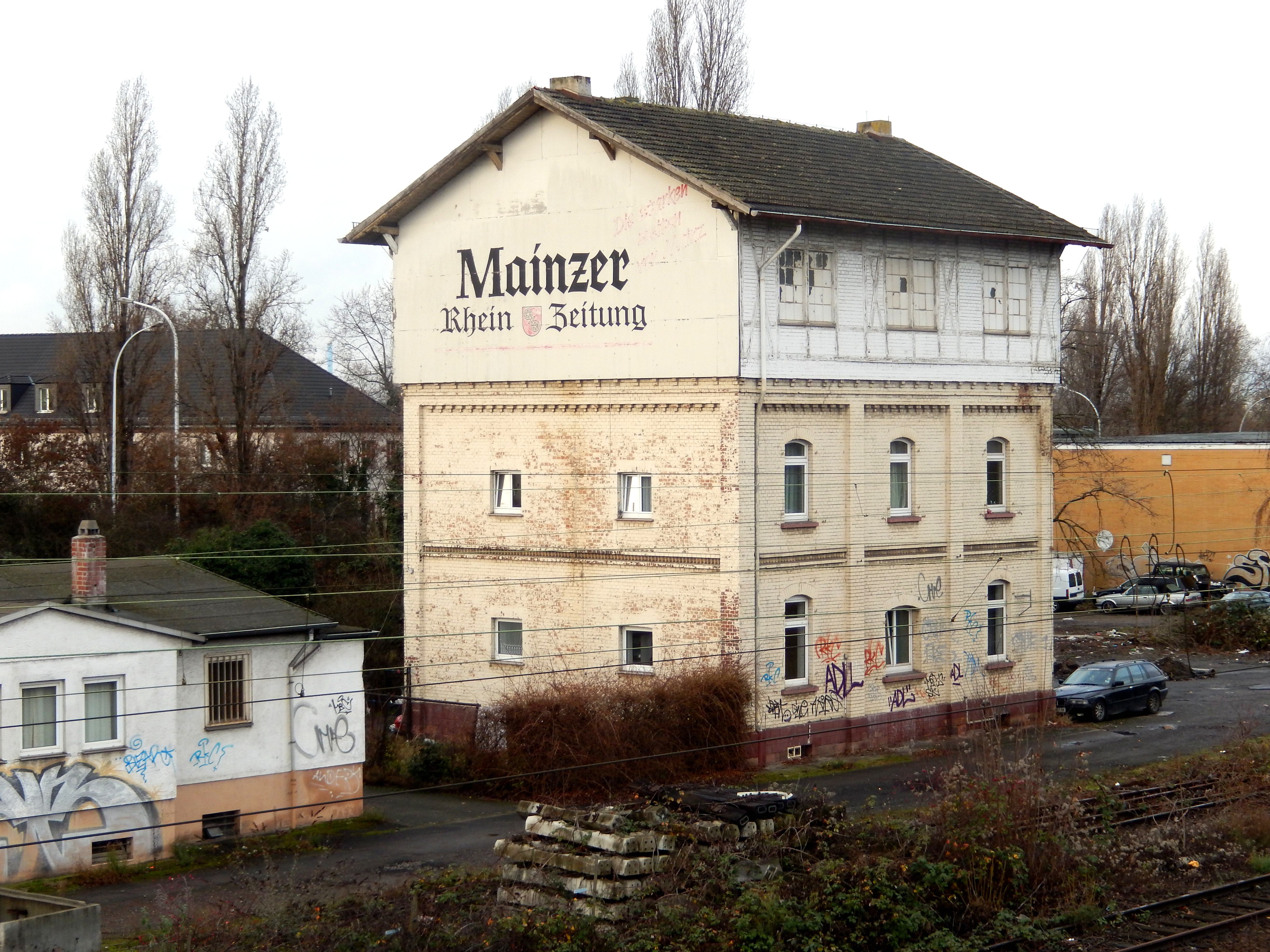 Ein Wohnhaus in der Nähe des Bahnhofs Mainz-Kastel westlich der Taunus-Eisenbahn mit Werbung für die Mainzer Rhein-Zeitung